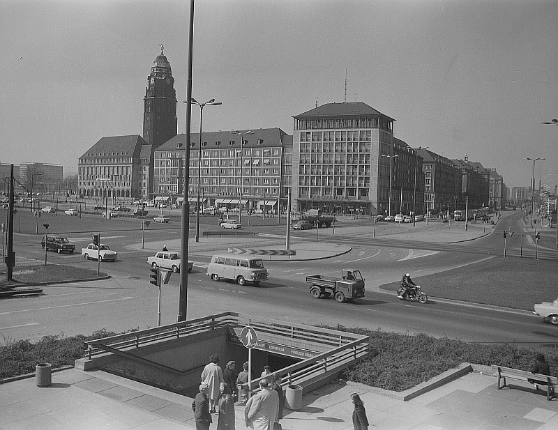 Original image description from the Deutsche Fotothek Dresden. Blick über den Pirnaischen Platz Richtung Rathaus